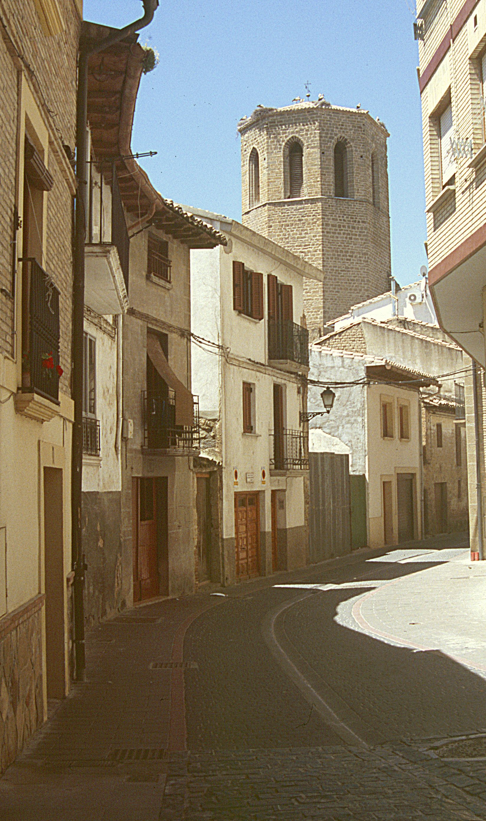 Straße in Sangüesa